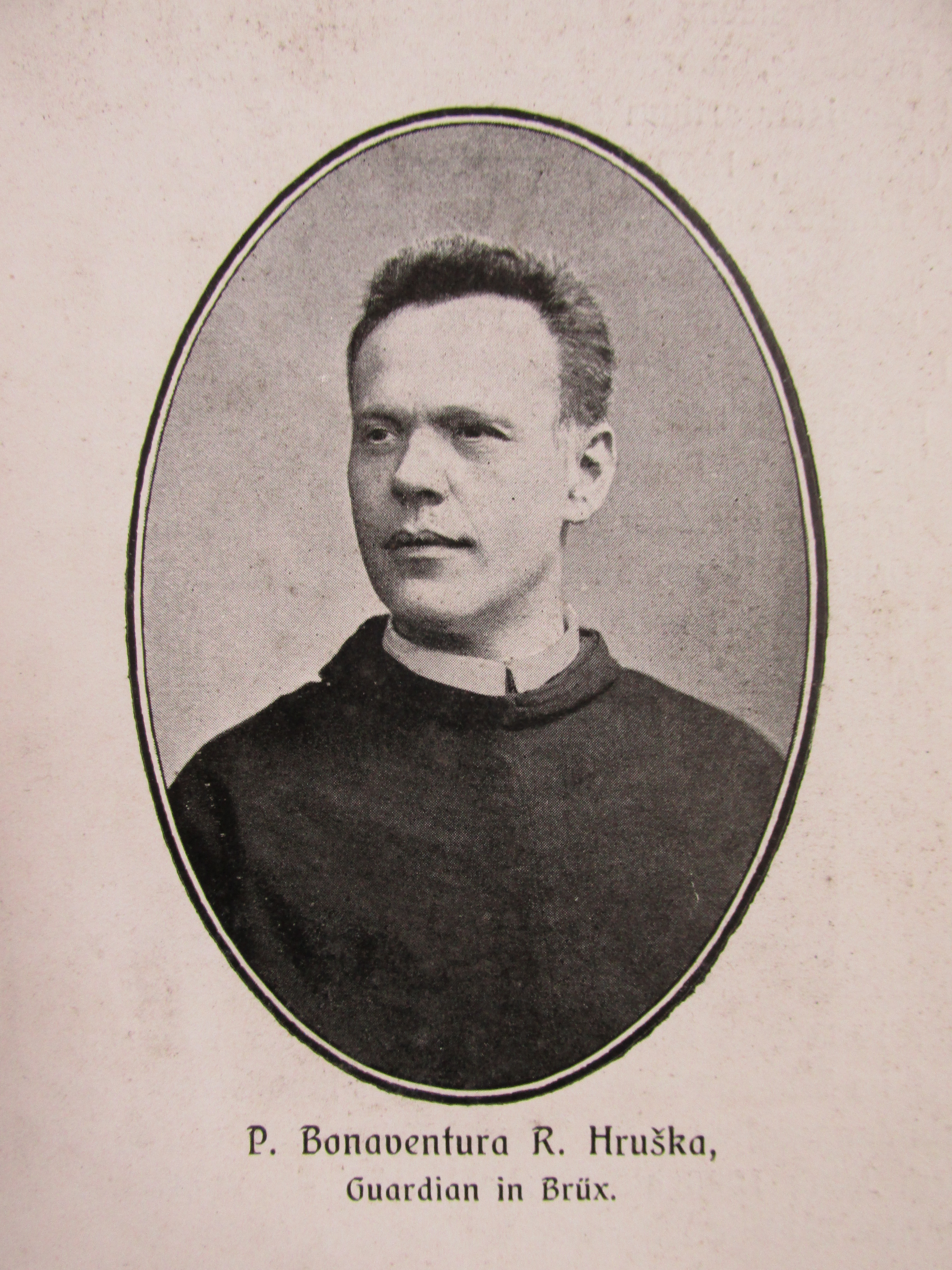 P. Bonaventura Raimund Hruschka OFMConv.; * 02. 09. 1863 Kojetín, čp. 122; syn: Josef Hruschka, syn Franze Hruschky a Franzisky roz. Mraček; Franziska, dcera Franze Mořického a Marianny Kubeš; gymnaziální studia na Českém gymnáziu v Olomouci; obláčka 19. 09. 1885; věčné sliby 22. 04. 1889; ord. na kněze 04. 07. 1889; kooperator v Praze; kooperator v Jihlavě; kooperator v Brně; řádový představený v Brně (od 1902); katecheta českých škol v Mostě; vojenský kaplan v Mostě (od 1906); řádový představený v Mostě